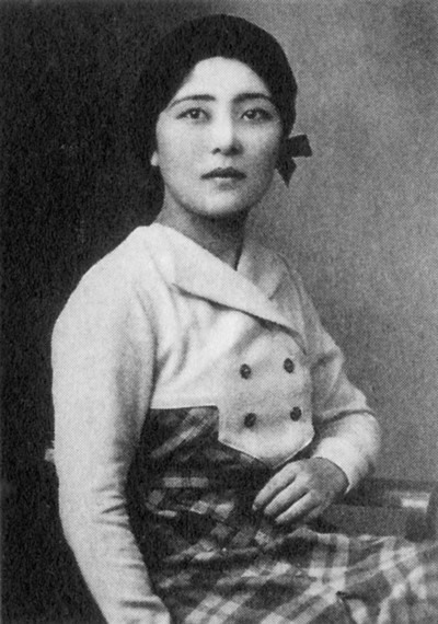 Maya Kataoka (Japanese, *1909, †2003)